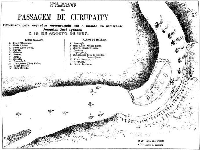 Plano da Passagem de Curupaity. Esse desenho foi remetido à redação da - Semana Ilustrada - pelo Exm. Sr. Barão de Inhaúma, almirante da esquadra em operações no Paraguay.